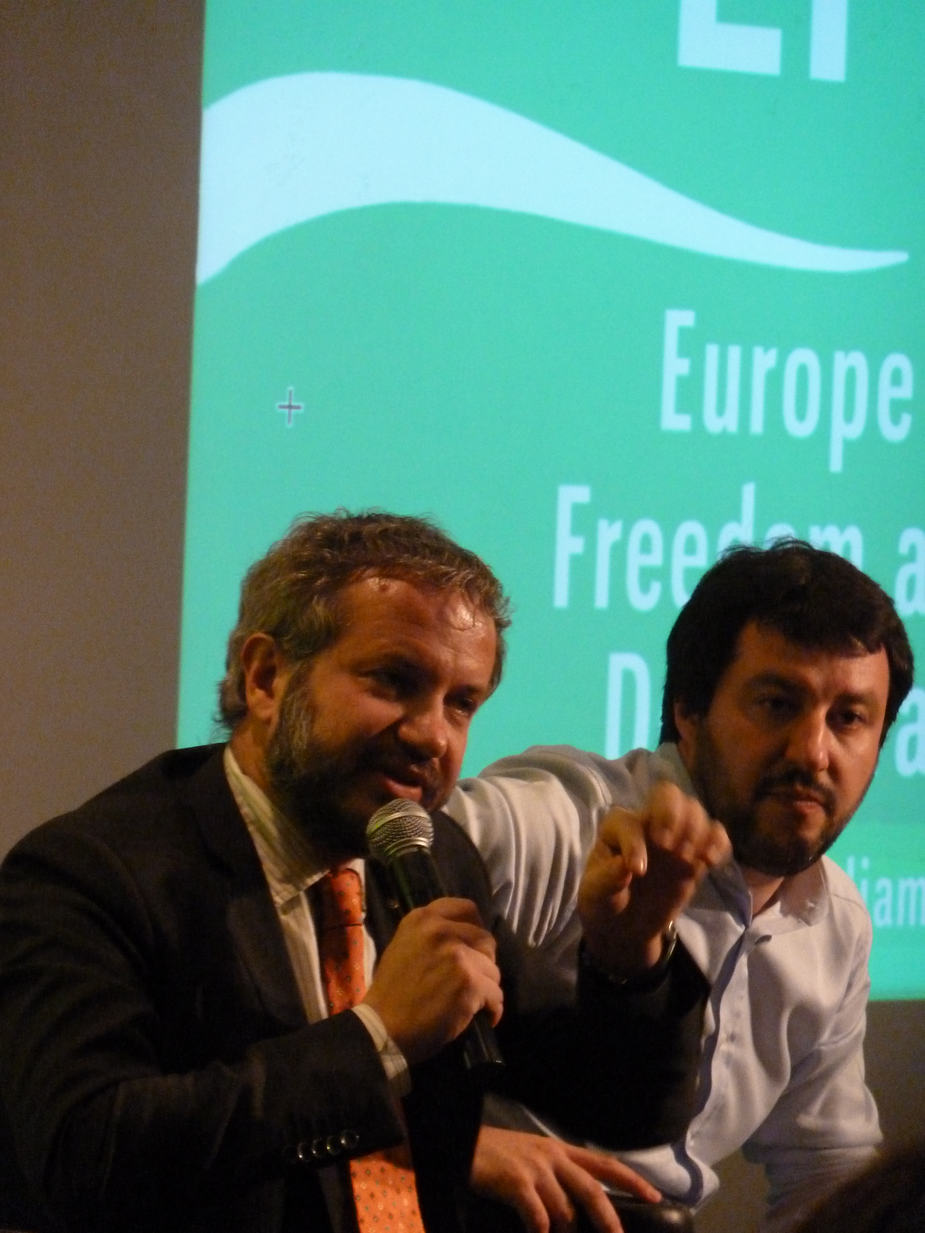 Convegno "No Euro Day" organizzato dalla Lega Nord all'Hotel dei Cavalieri a Milano, il 23 novembre 2013. Organizzatore, l'eurodeputato Matteo Salvini, mentre gli ospiti sono stati i professori Claudio Borghi, Antonio Rinaldi e Alberto Bagnai.